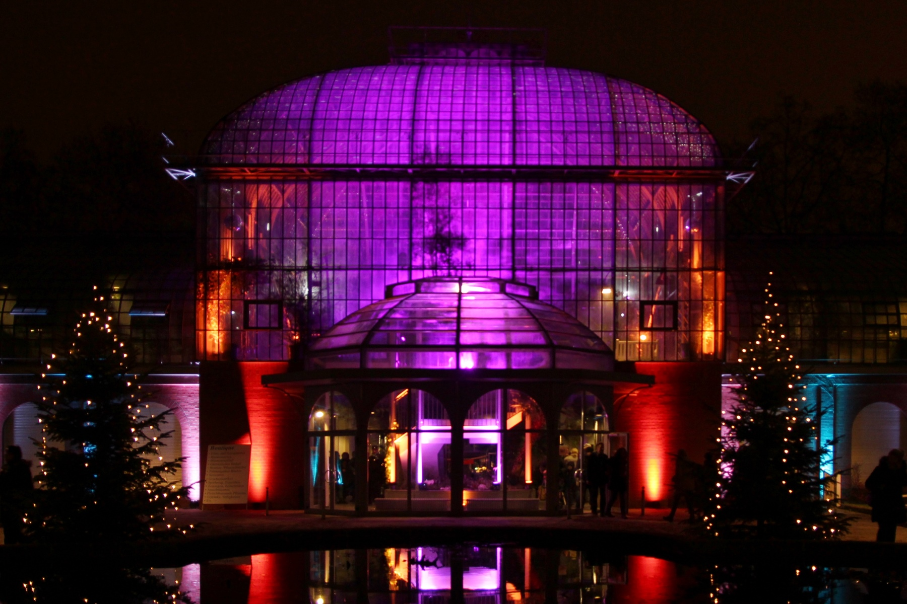 "Winterlichter"-Installation im Palmengarten Frankfurt 2017